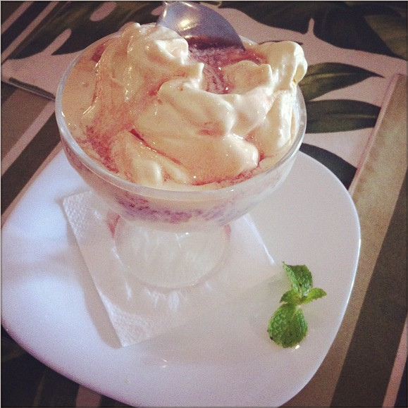 Creme de Papaya com Cassis